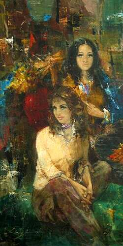 A művész lányai